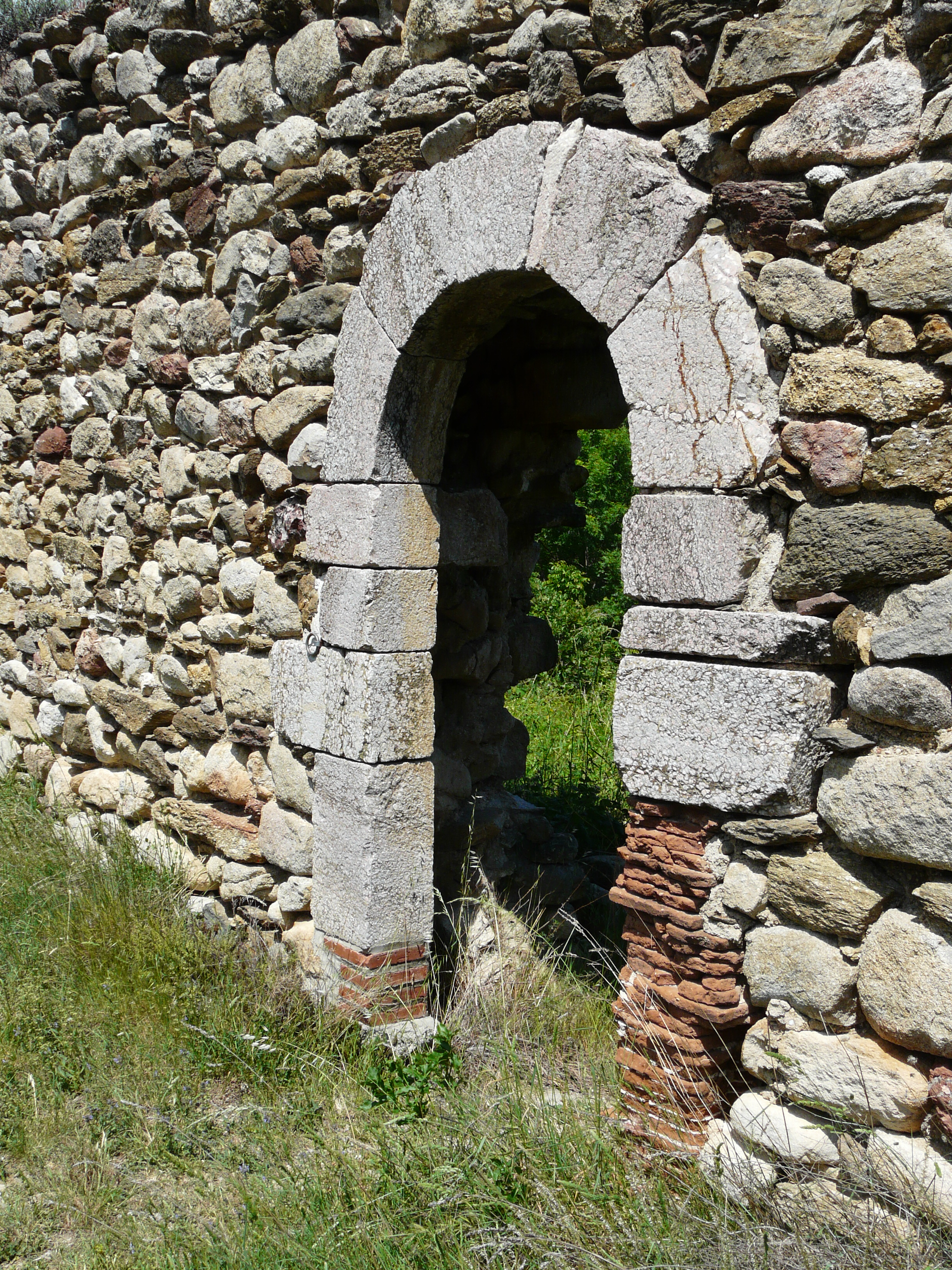 Porta sud de Sant Pere de Fillols